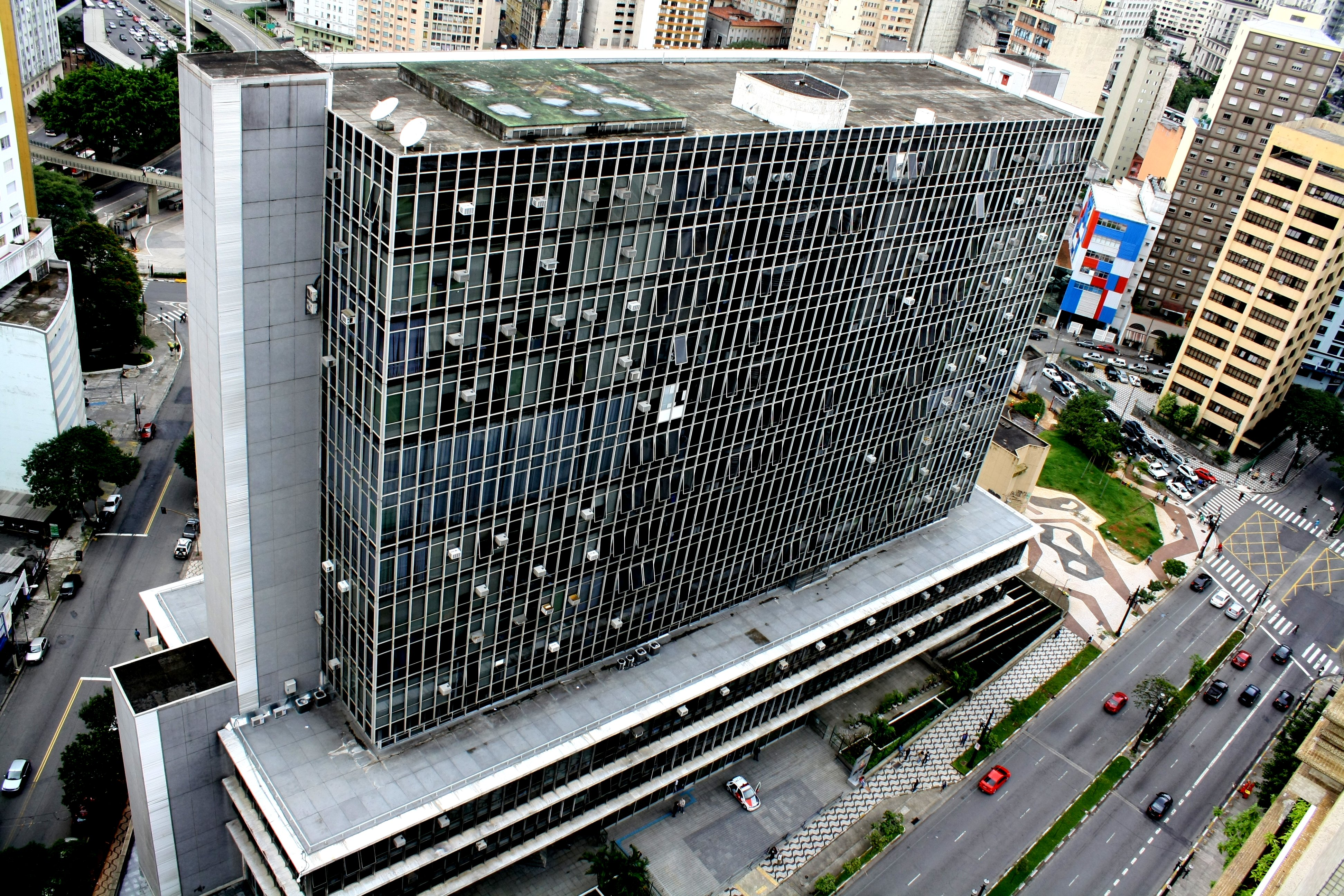 Vista do Palácio Anchieta, sede da Câmara Municipal de São Paulo